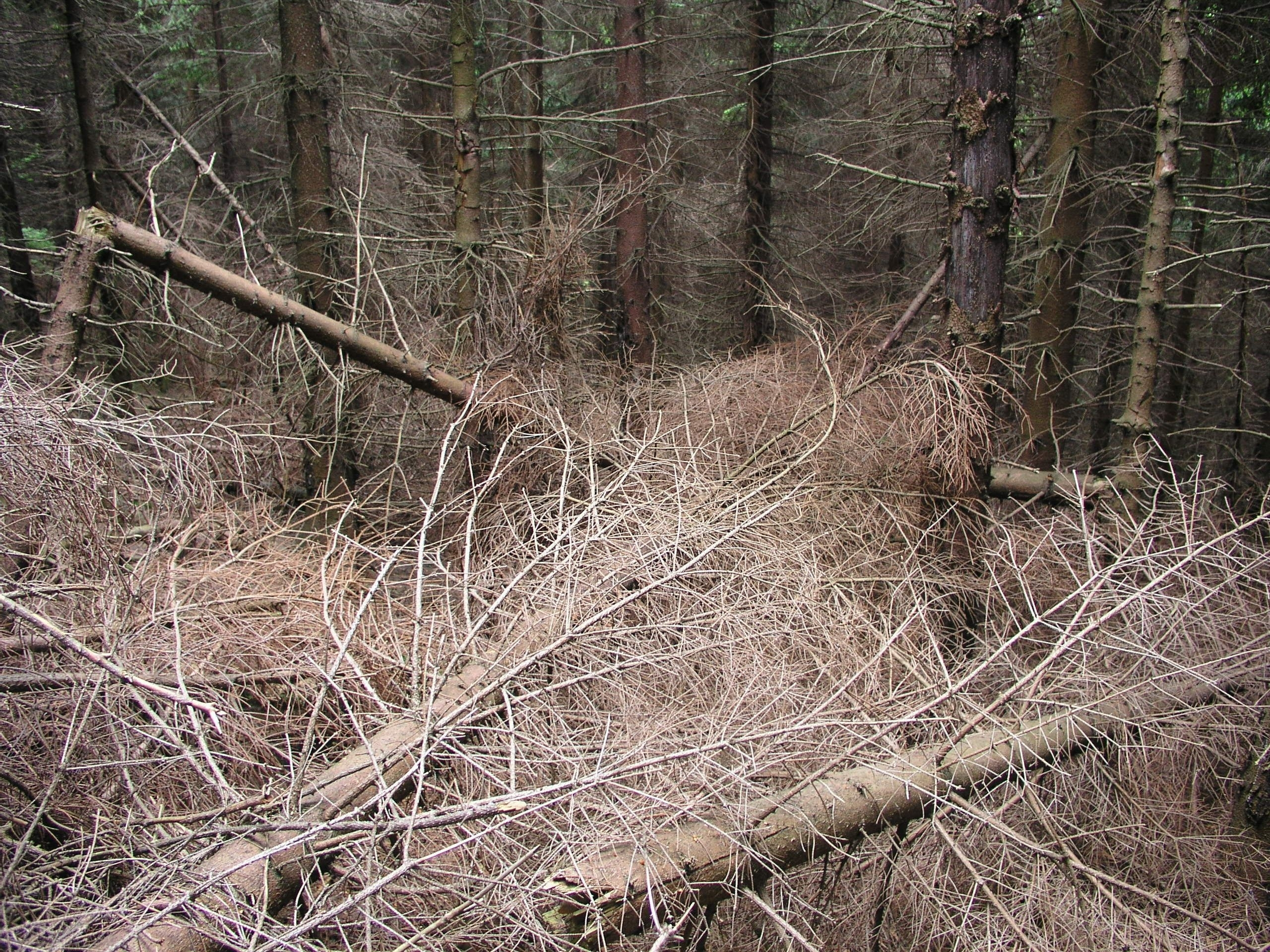 Před zásahem Čmeláka na místě Nového pralesa byla jen smrková poušť, kde nic nerostlo.